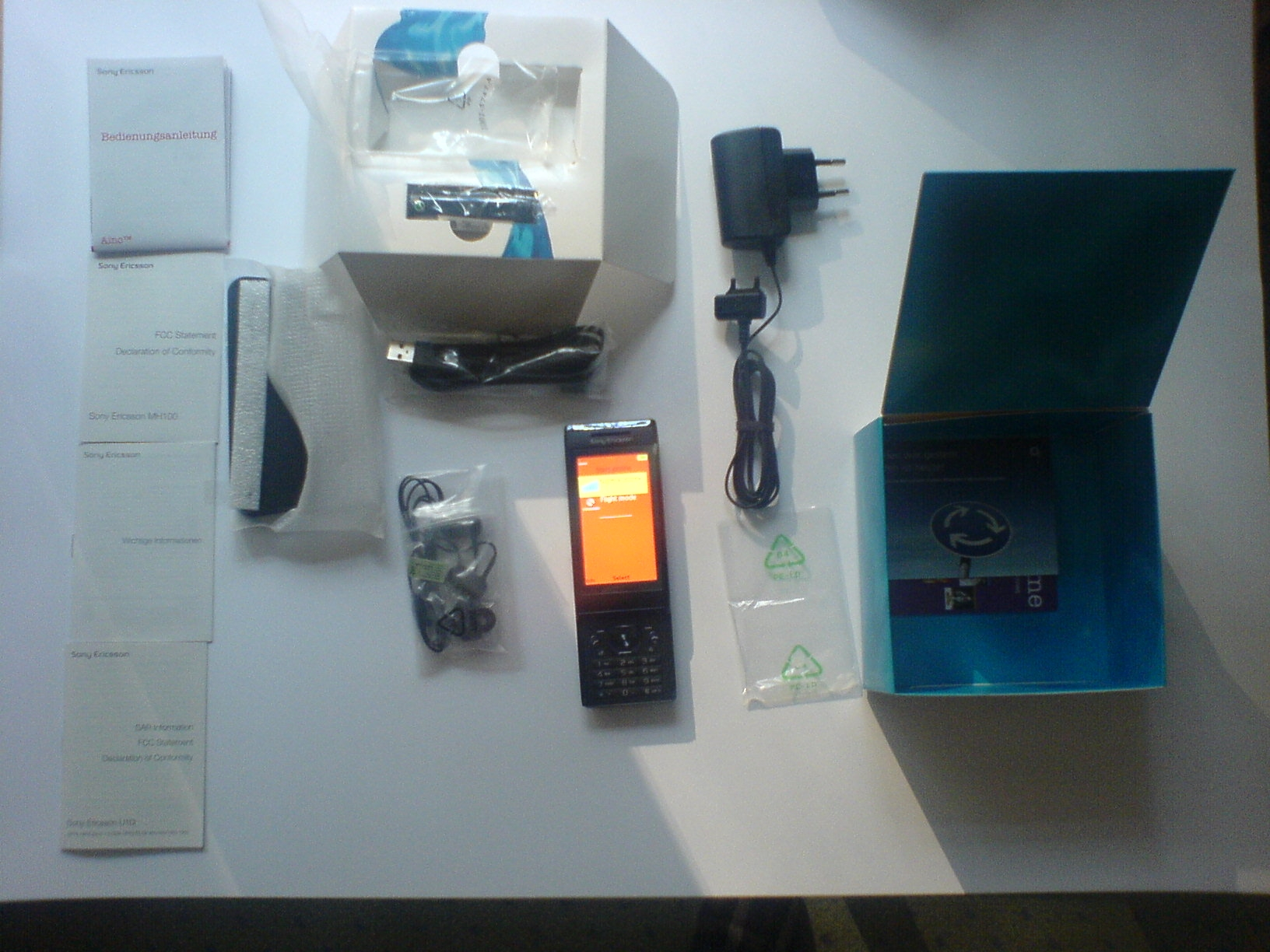 Sony Ericsson Aino (U10i) mit Zubehör und Verpackung (Akku im Gerät), Bj. 2010.